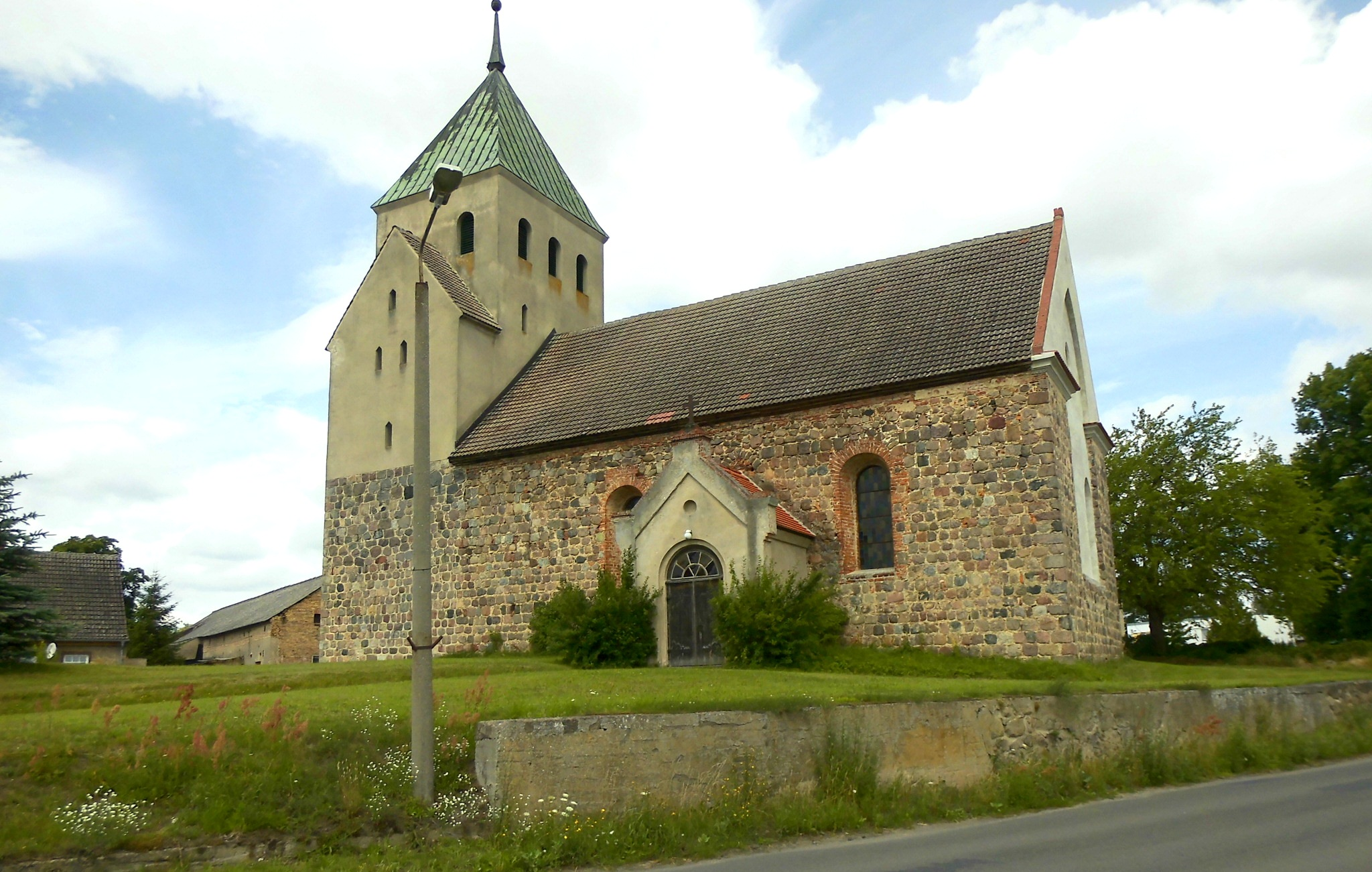 Dorfkirche in Haßleben, Gemeinde Boitzenburger Land, Landkreis Uckermark, Deutschland